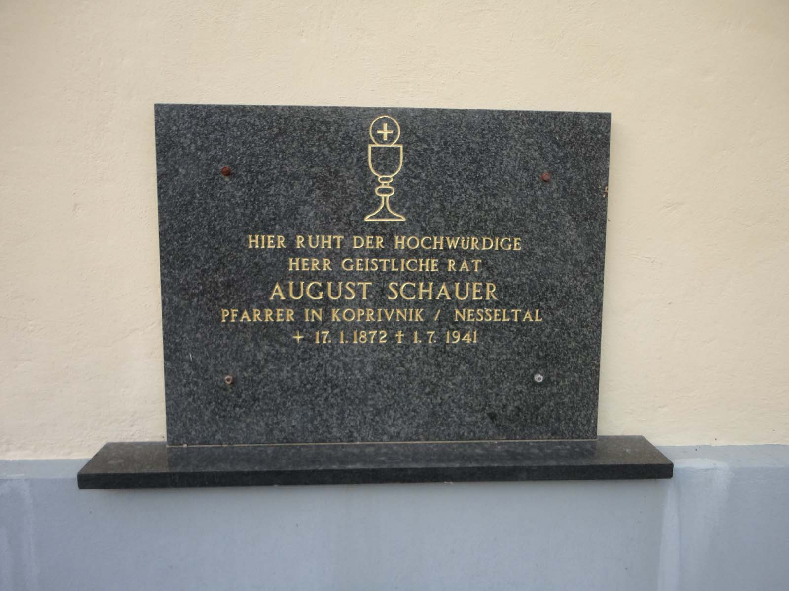 Spominska plošča župniku v Koprivniku - August Schauer - na steni cerkve sv. Andreja v Kočevskih Poljanah